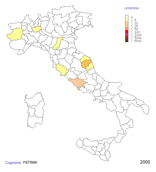 Presenza in italia di familia Pietrani